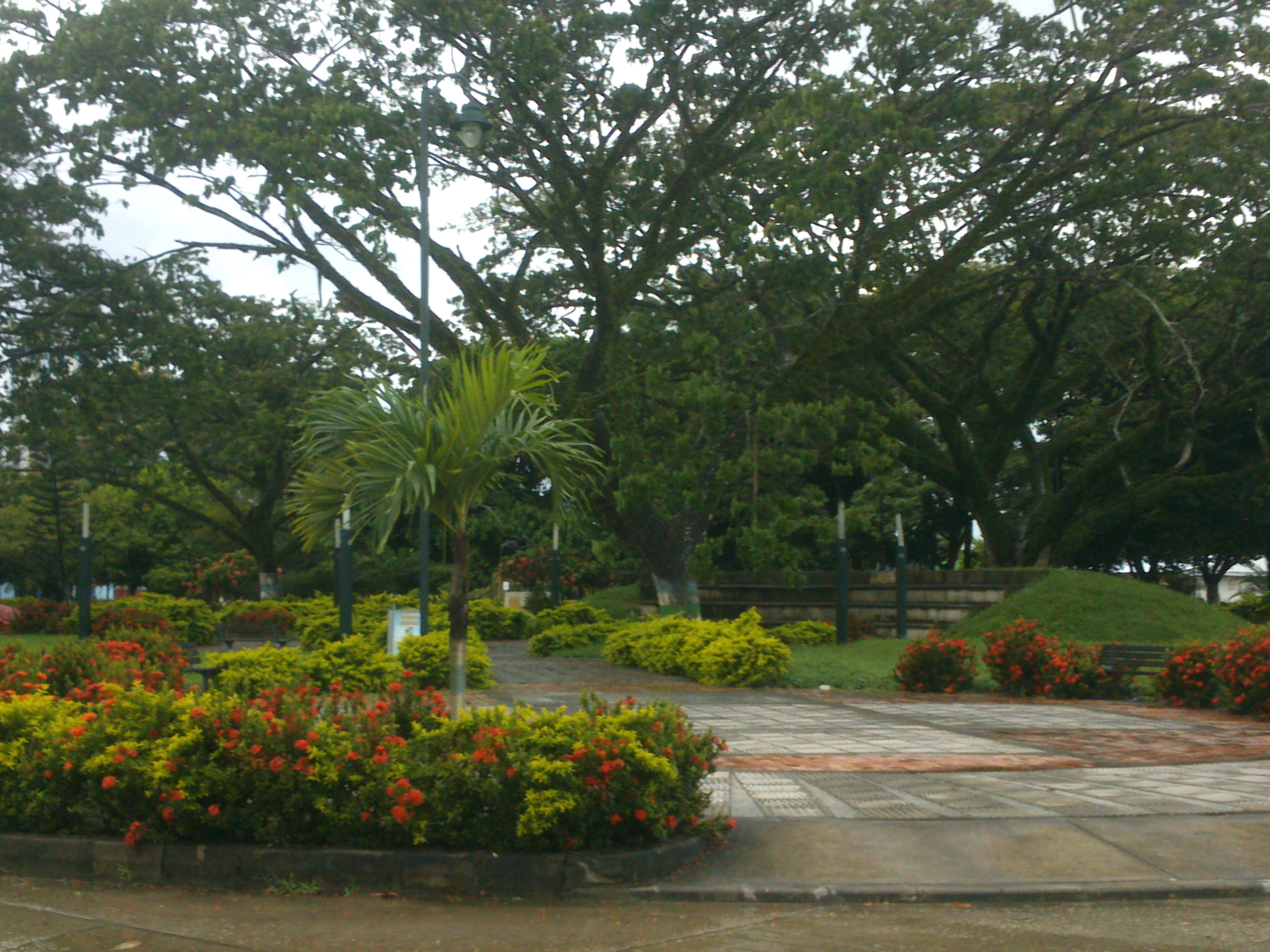 Ubicación: PUERTO RONDON, ARAUCA